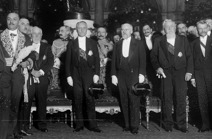 Réception à l'hôtel de ville de Paris du président de la République française Paul Deschanel et des anciens présidents Émile Loubet, Raymond Poincaré et Armand Fallières.